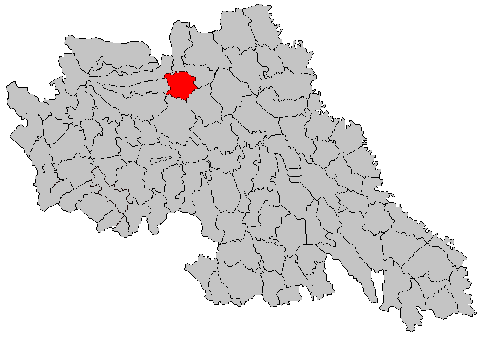 Categorie:Hărţi ale judeţului Iaşi